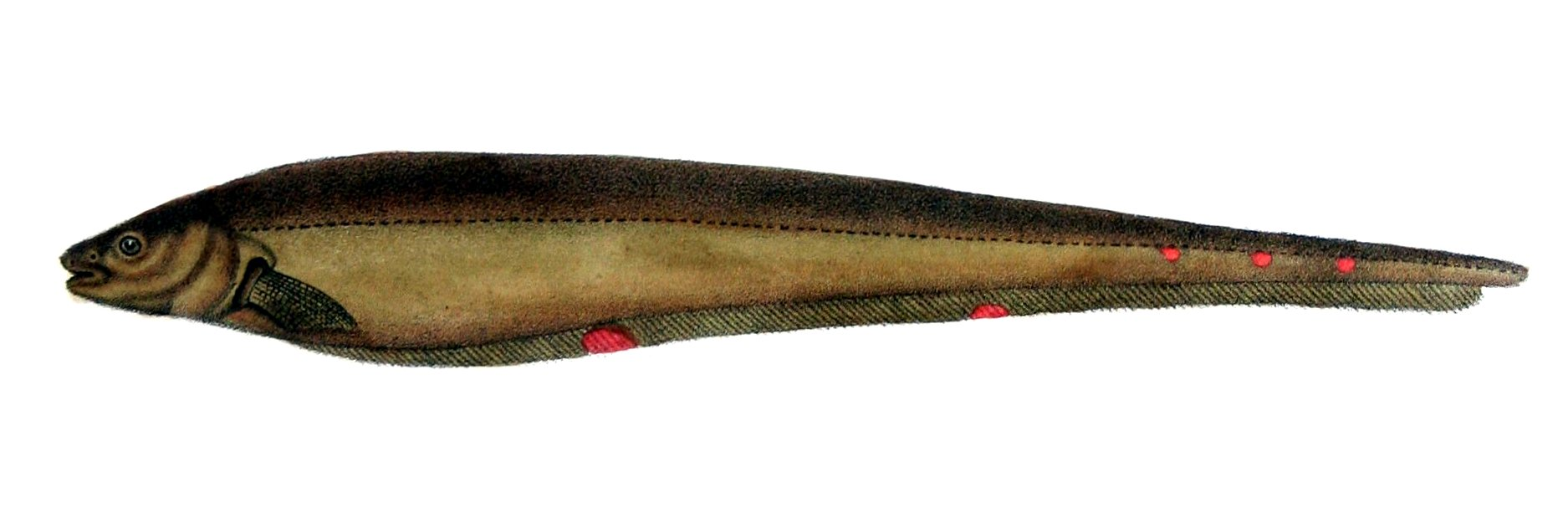 Carapus sanguinolentus Cast. = Sternopygus macrurus (Bloch & Schneider, 1801)